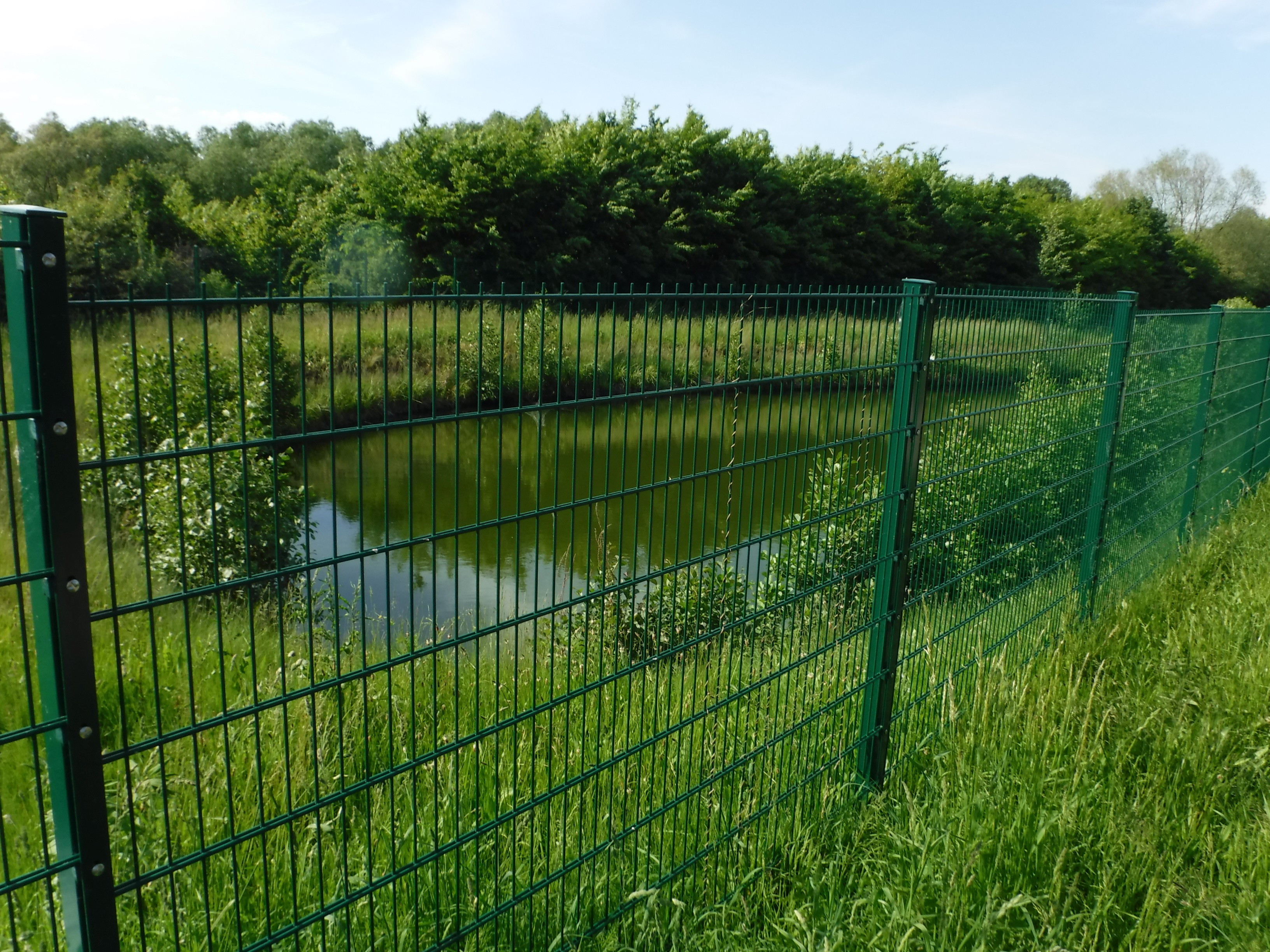 Abwassertechnische Anlage in Gönnsdorf